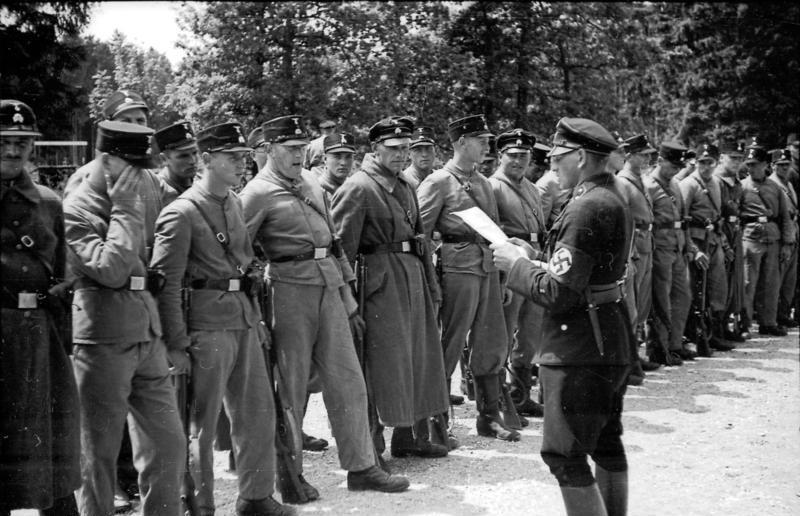 Schutzhaftlager Dachau, 27.5.33, angetretene Wachmannschaft der SS, Fotograf: F[riedrich] F[ranz] Bauer